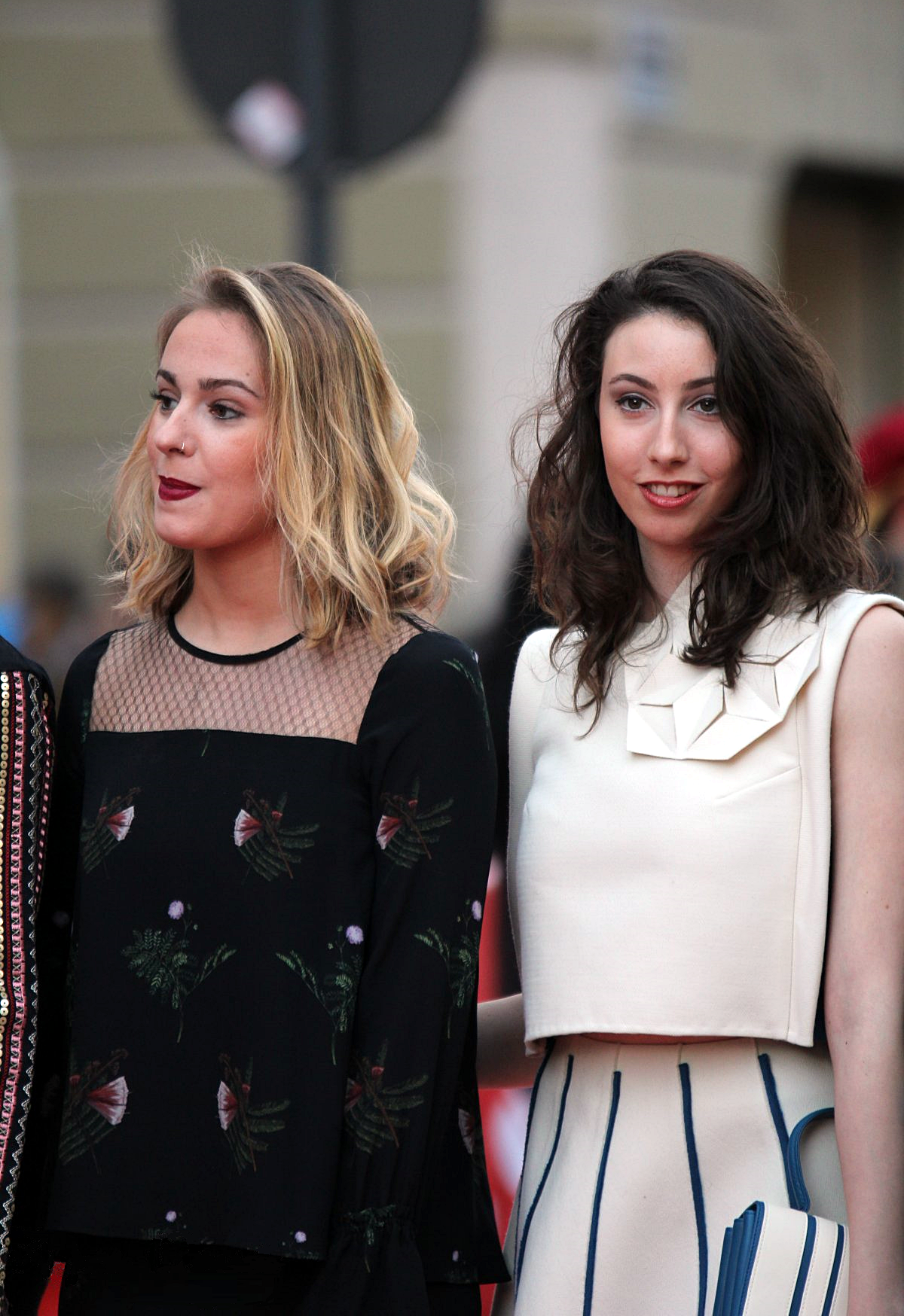 Las gimnastas rítmicas españolas Elena López y Artemi Gavezou en la XXXVII Gala Nacional del Deporte de la Asociación Española de la Prensa Deportiva, celebrada en Valladolid el 6 de marzo de 2017.